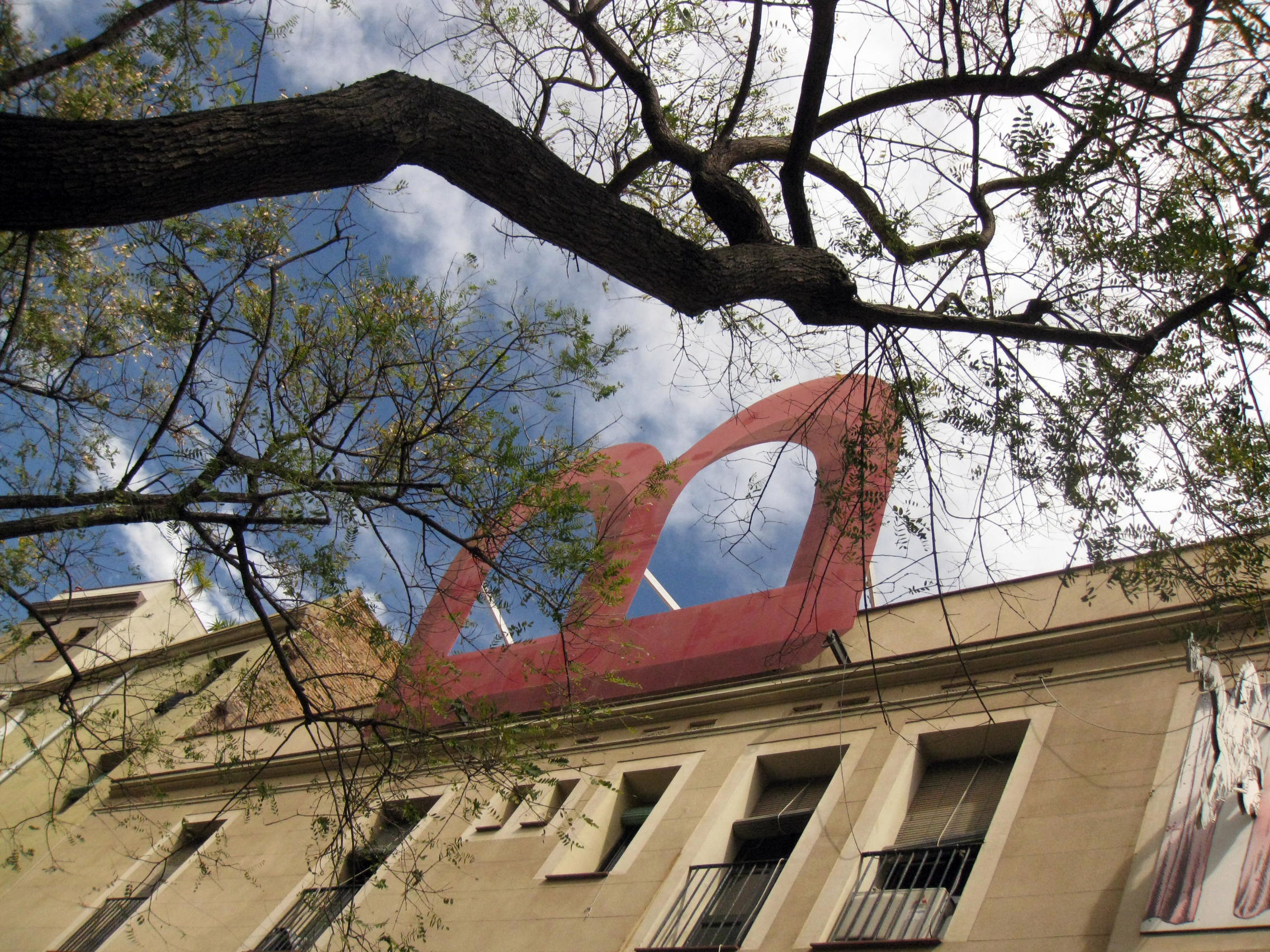 Espai Escènic Joan Brossa. C. Allada - c. Vermell (Barcelona)